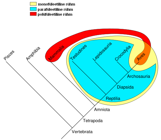 Fülogeneetilised rühmad